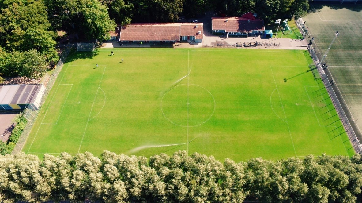 Drönarbild av Mariedals IP i Malmö.